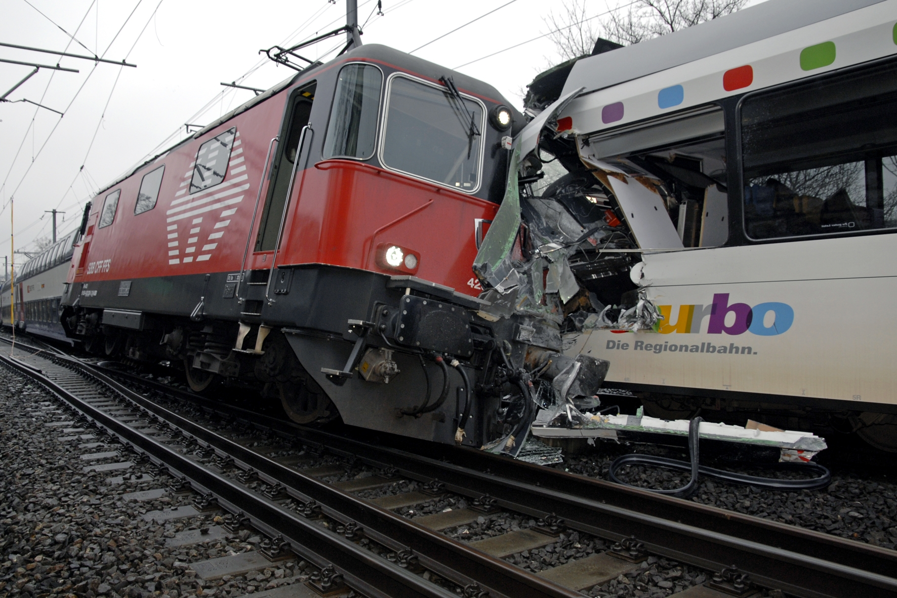 Unfallfoto Blickrichtung Neuhausen Am 10. Januar 2013 kollidierte eine nach Schaffhausen fahrende Zugskomposition des Regionalverkehrsunternehmens Thurbo mit einem Doppelstockzug der S-Bahn Zürich, welcher Richtung Zürich fuhr. Die seitliche Streifkollision ereignete sich unmittelbar beim Bahnhof Neuhausen am Rheinfall. Durch die massive Kollision wurden insgesamt 17 Personen verletzt. Die beiden Lokomotivführer blieben unverletzt.